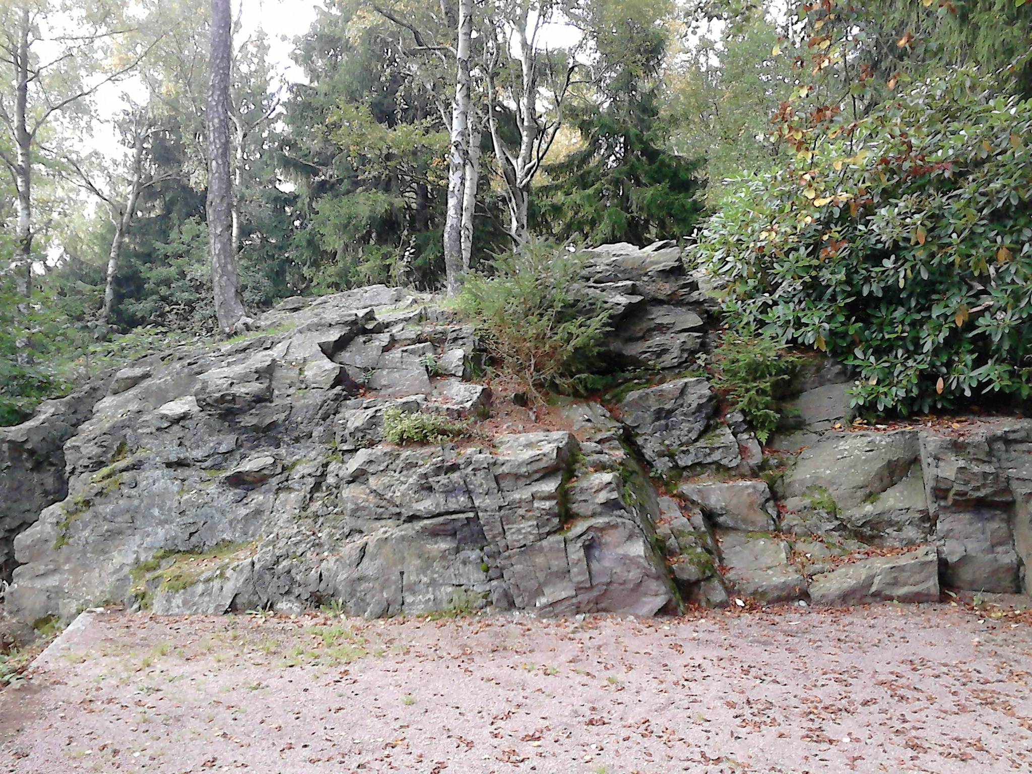 Die höchste Stelle des Steinberges bei Rothenkirchen / Wernesgrün. Namensgebendes Gestein. Gemeinde Steinberg, Sachsen, Deutschland.